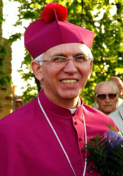 Wacław Depo - biskup zamojsko-lubaczowski